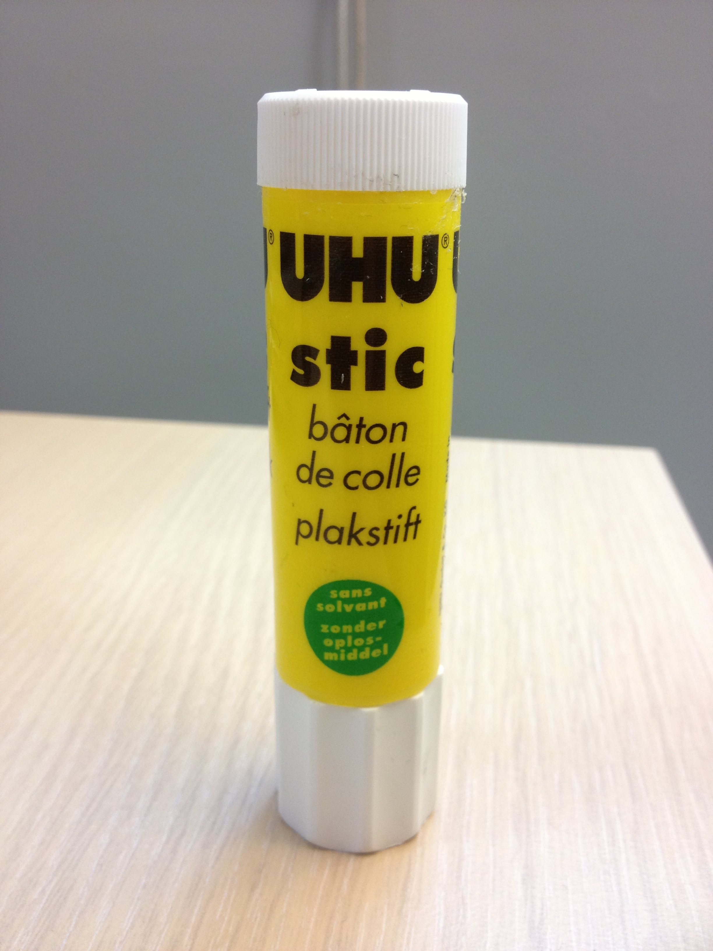 Bâton de colle de la marque UHU UHU glue stick